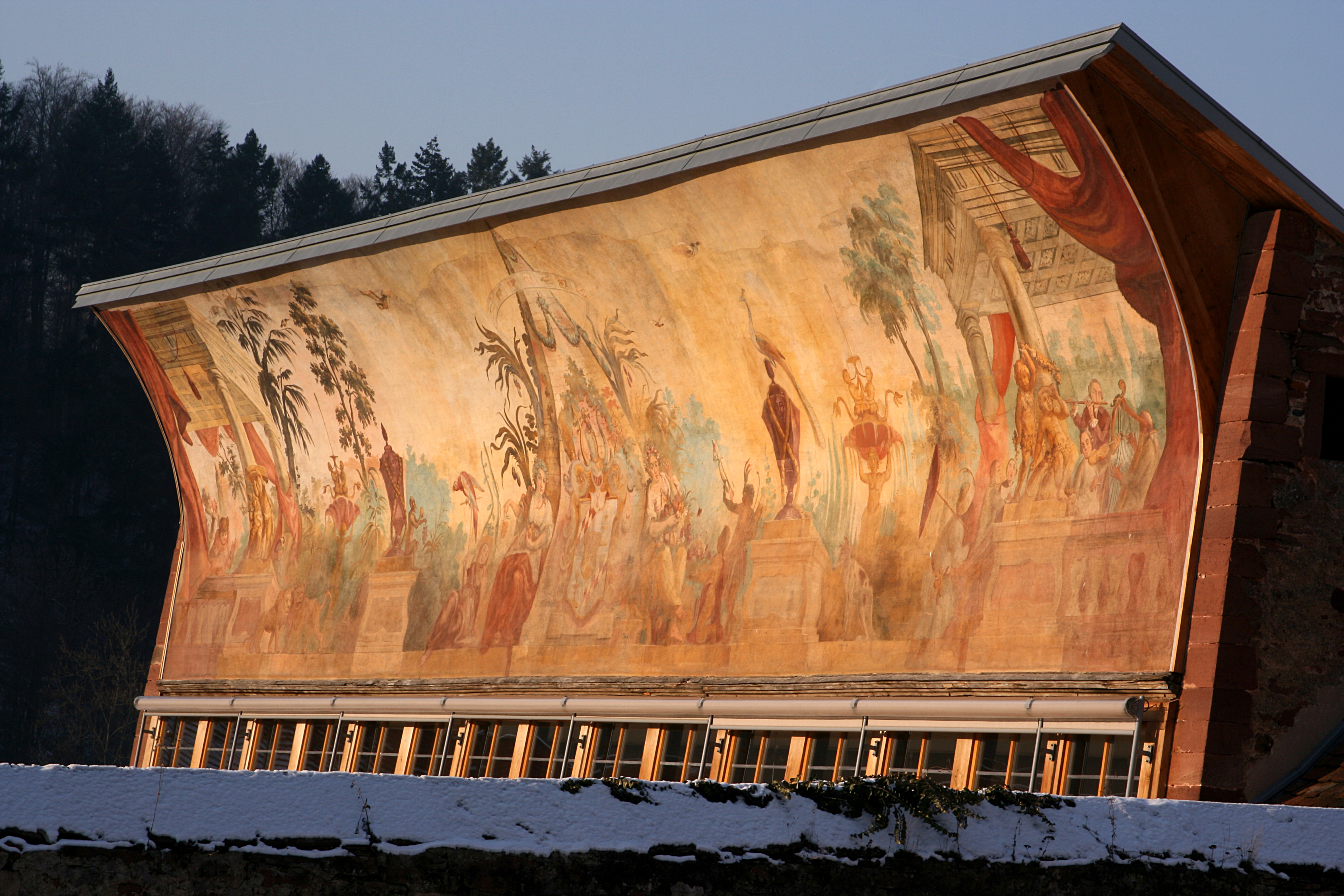 Kloster Bronnbach im Taubertal, Orangerie, größtes Außenfresko nördlich der Alpen, auf der Pyramide Wappen des Abtes Ambrosius (Ambros) Balbus